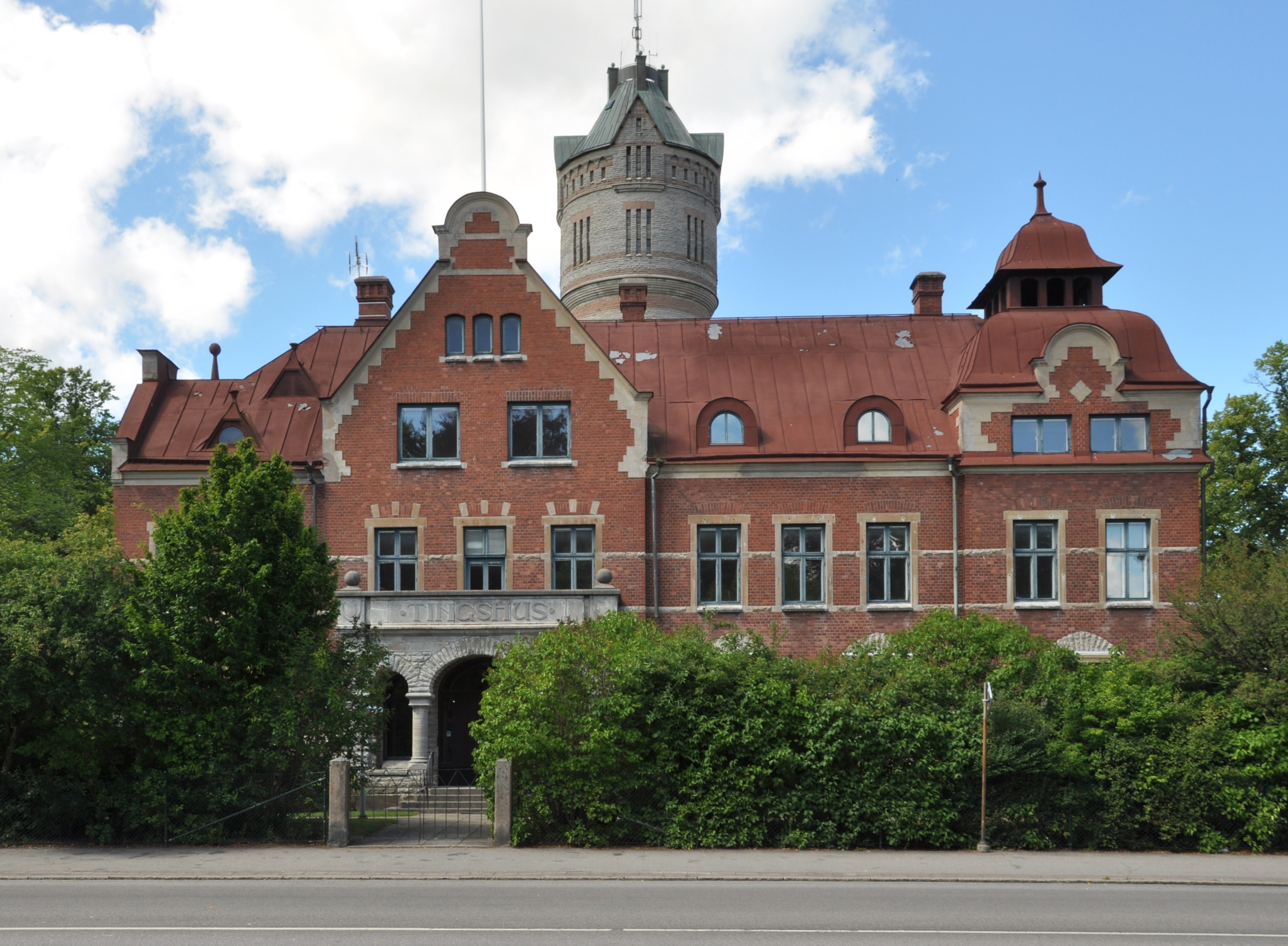 Tingshuset i Lidköping. Nybyggnadsår 1902 - 1903 Johansson & Larsson (Byggmästare) Lars Kellman (Arkitekt)